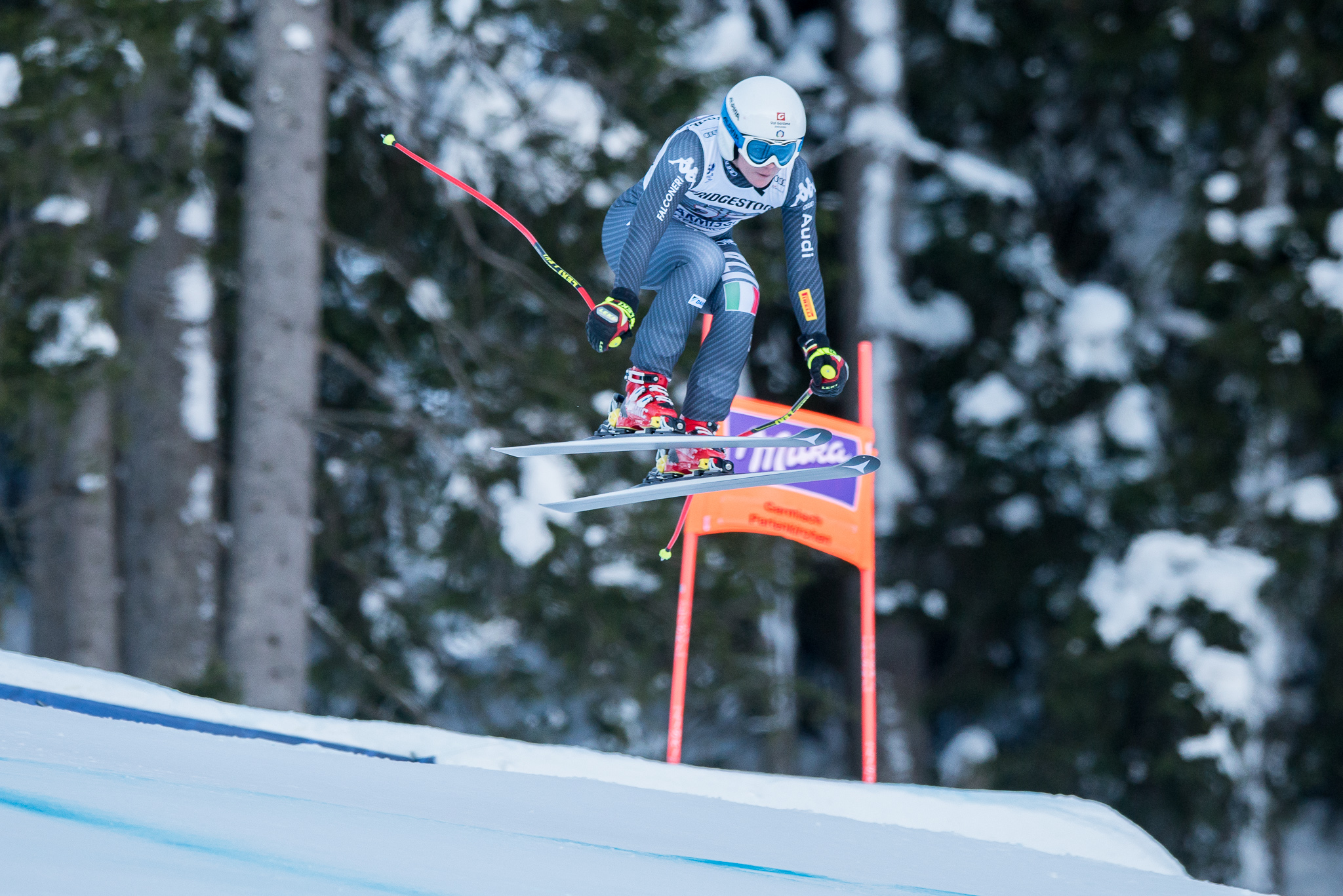 64. Kandahar Rennen,Audi FIS Ski Weltcup Garmisch-Partenkirchen,Damen Abfahrt,Kandahar,Ladies Downhill,Nicol Delago